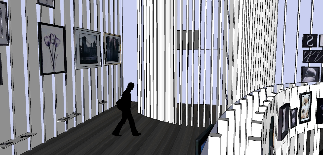 Template:Screenshotcopyrighted